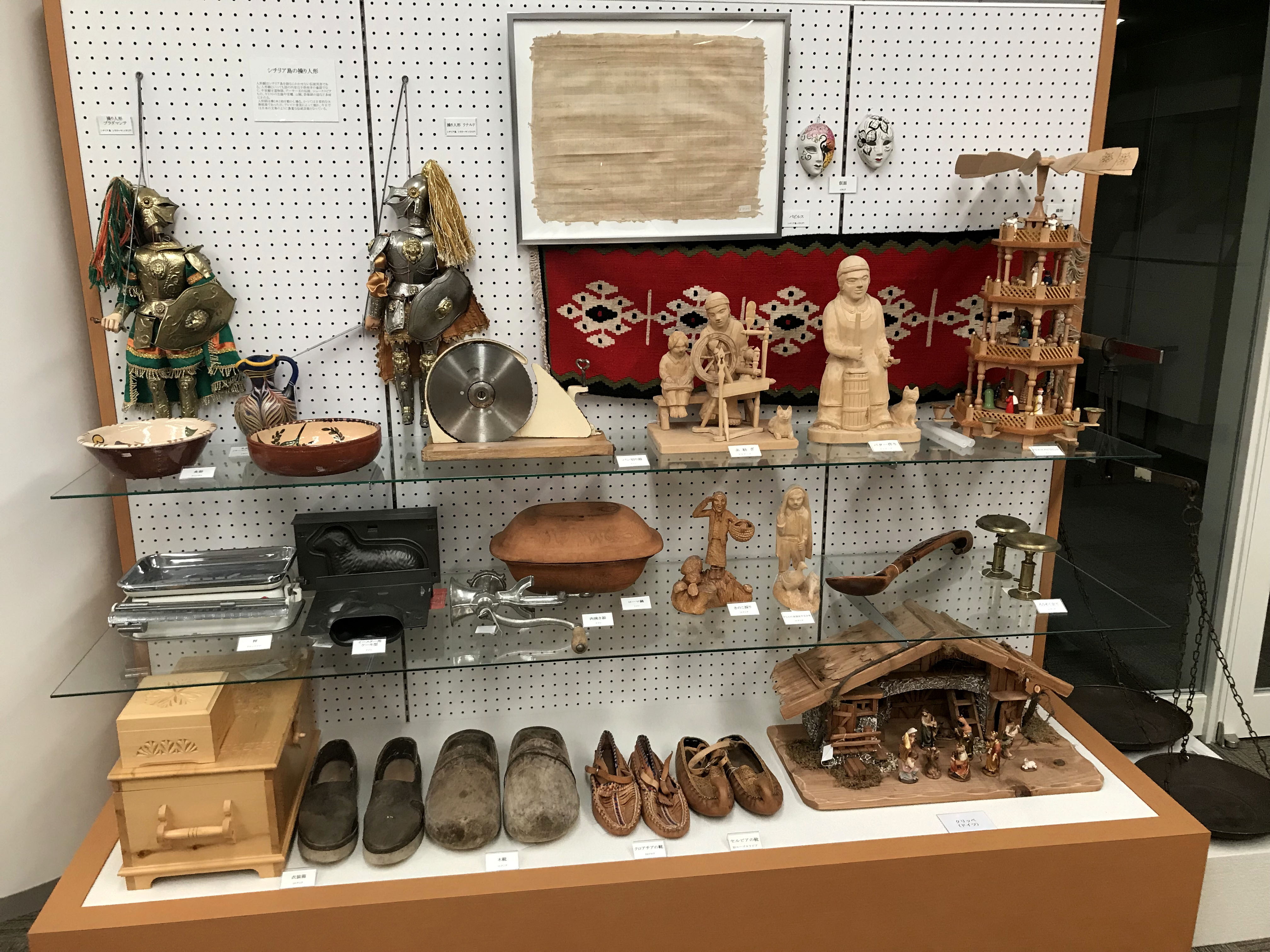 撮影場所：中部大学民俗資料博物館のオセアニアエリア 撮影日：２０１９年７月２日 パピルス、仮面(イタリア)、織物、食器、シチリア島の操り人形(プラダマンテ、リナルド)、パン切り器、糸紡ぎ、バター作り、クリスマスピラミッド、秤、イースター用ケーキ型、肉挽き器、ローマ鍋、きのこ採り、アヒルの世話をする少年、ろうそく立て、衣装箱、木靴、クロアチアの靴、セルビアの靴、クリッペ(ドイツ)